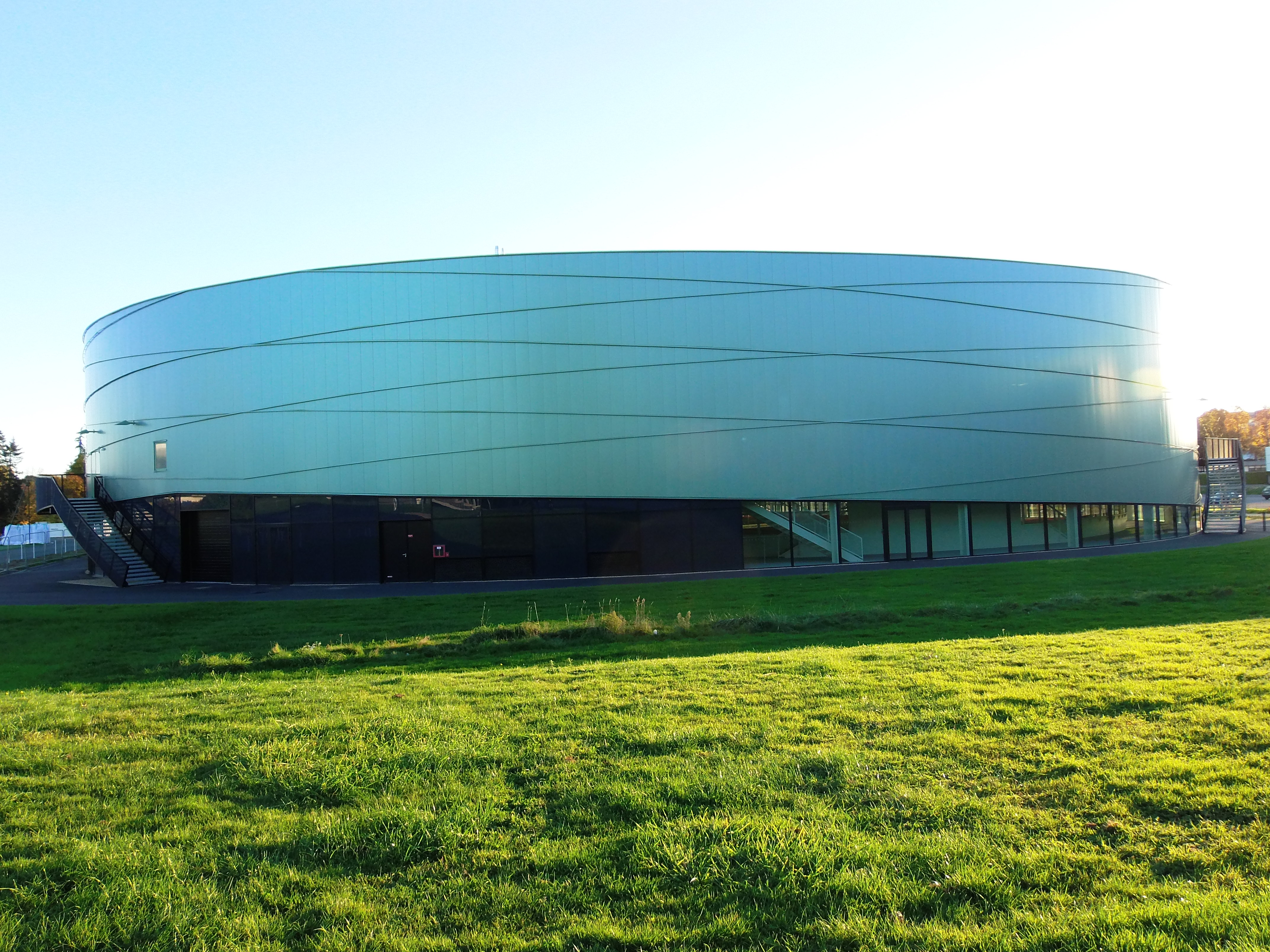 Stade Robert-Poirier, Campus de Villejean, Université Rennes 2